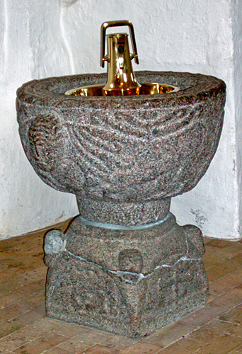 Døbefont i Stilling Kirke Hjelmslev Herred, Skanderborg Amt. Image by me USer:Nico-dk/Nils Jepsen